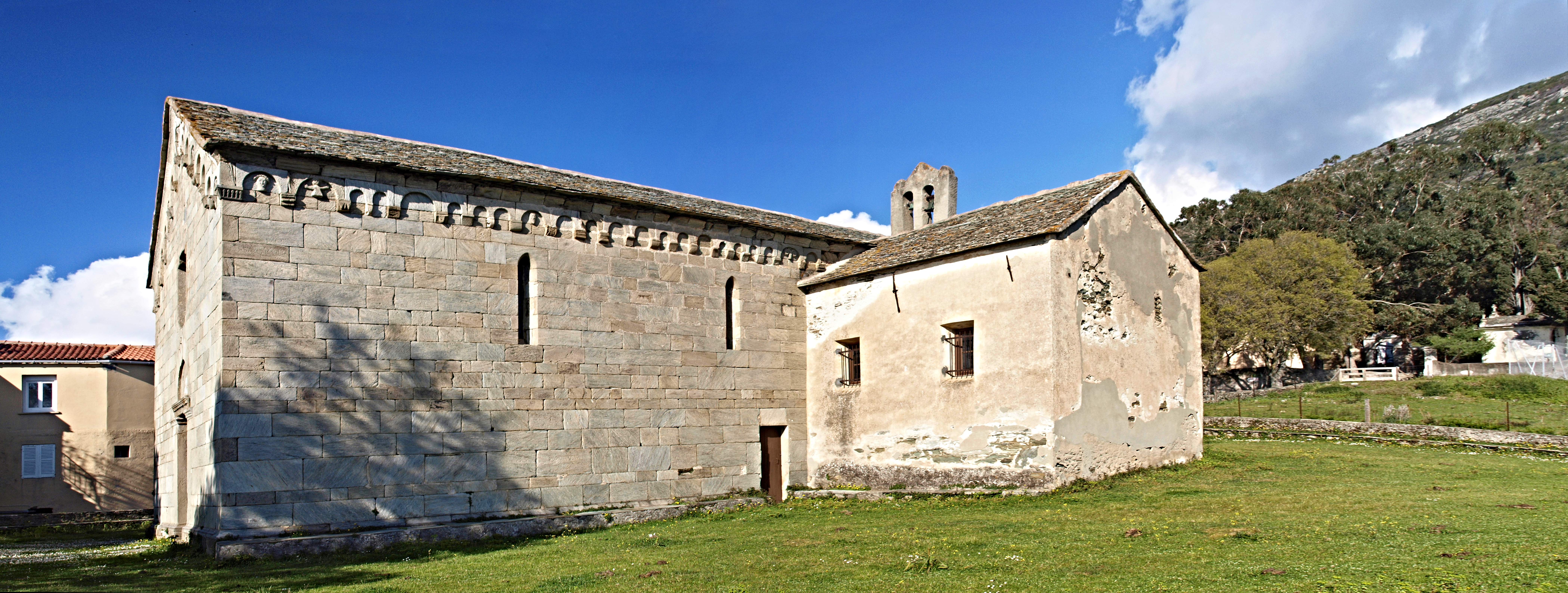 Canari (Corsica) - Église Santa-Maria Assunta (XIIe siècle)